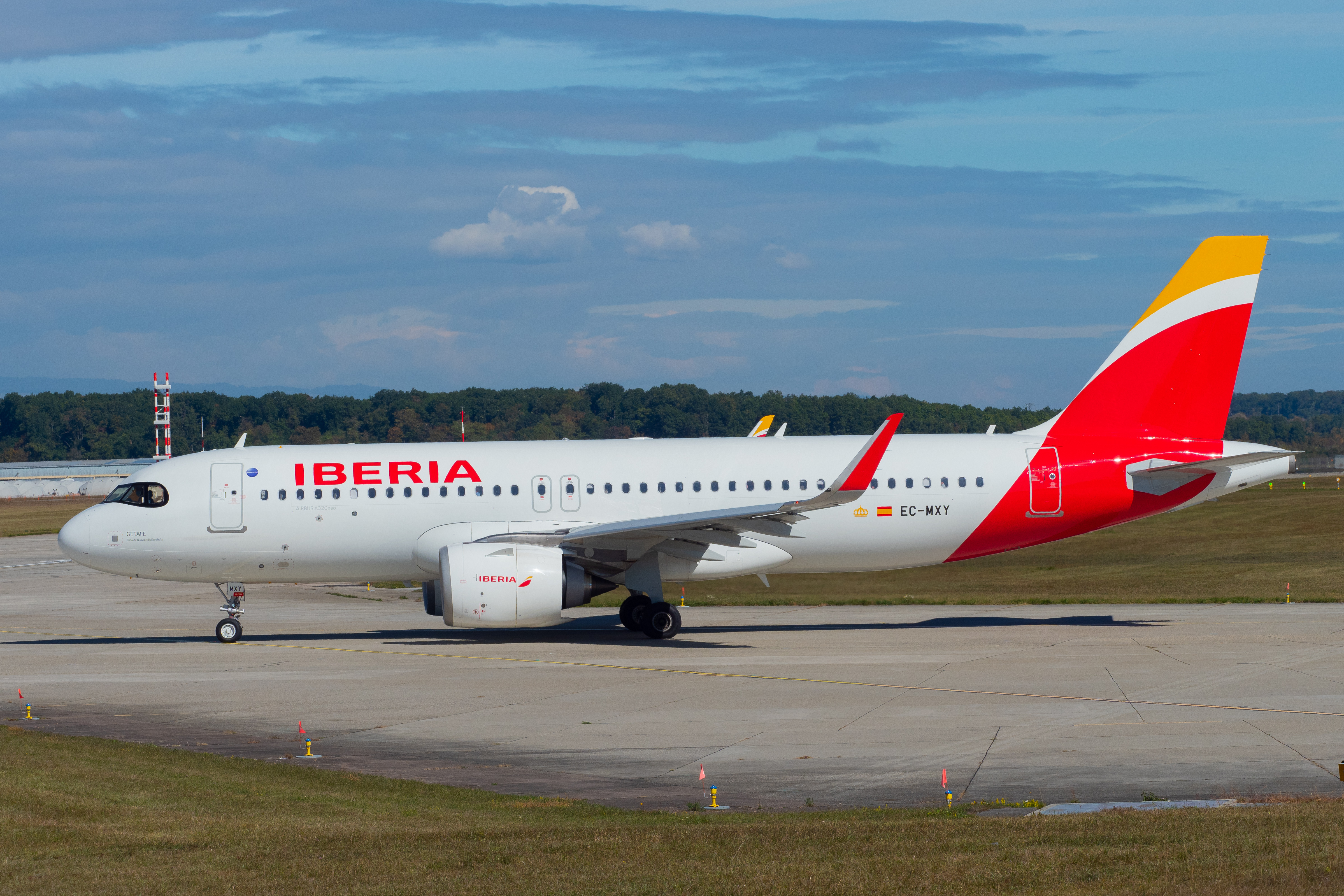 GVA Chemin des Papillons